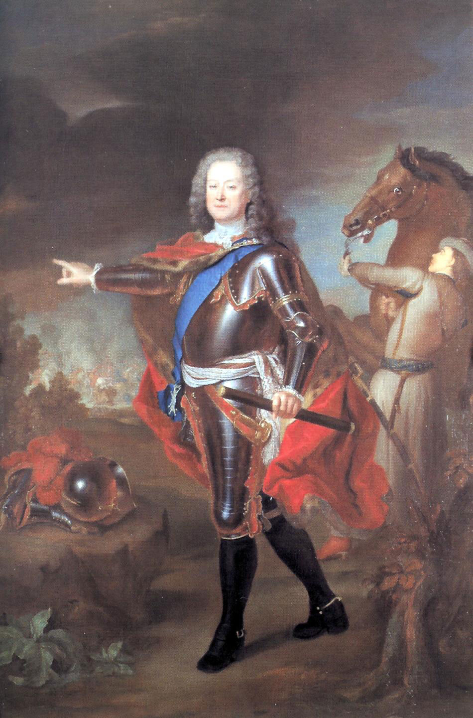 Беларуская (тарашкевіца): Партрэт графа Якуба Генрыка Флемінга (Jakub Henryk Fleming). Зь Нясьвіскай партрэтнай галерэі